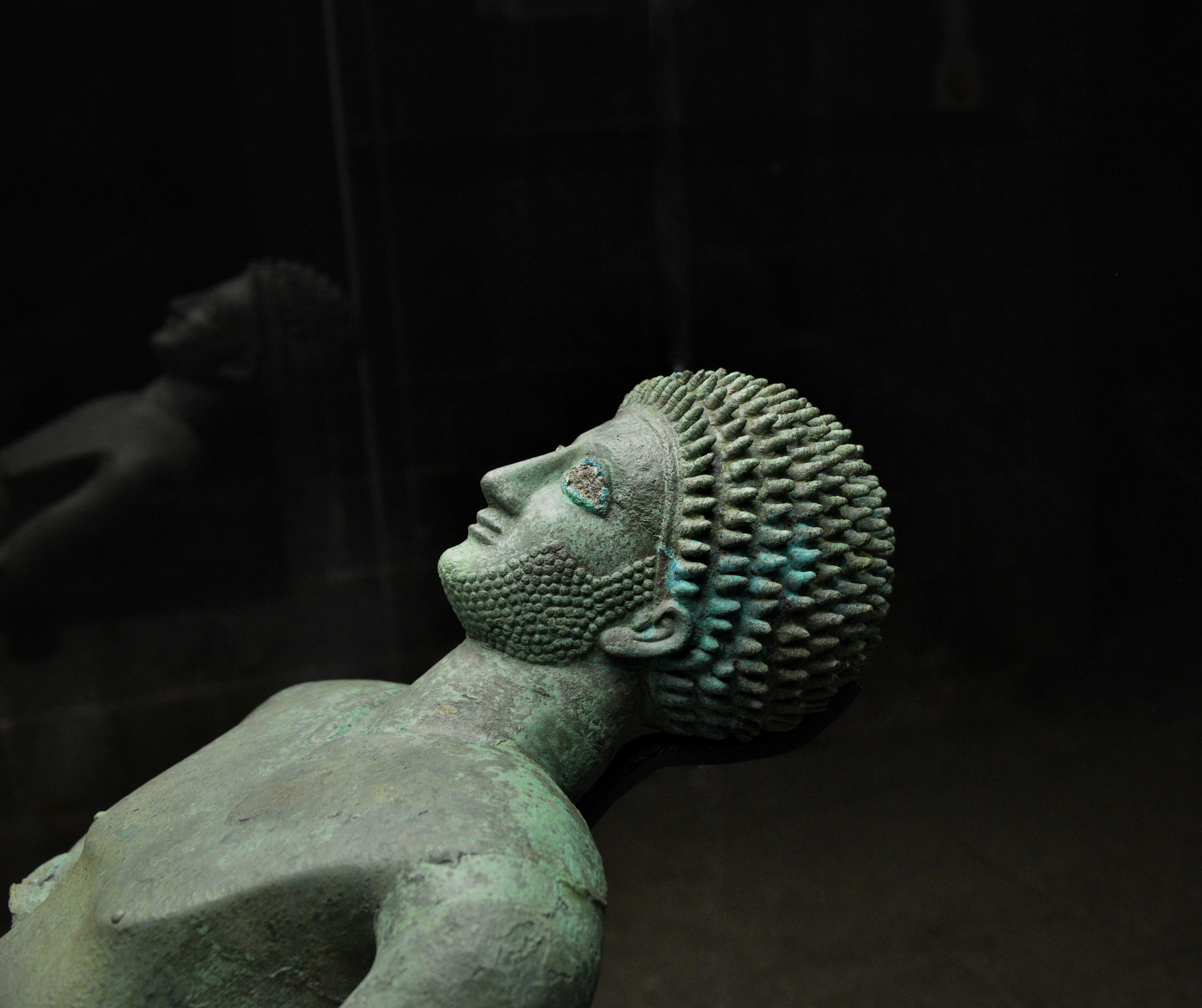 Yemen National Museum, Sana'a